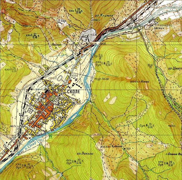 Мірило 1:25000, станом на 1948 р.